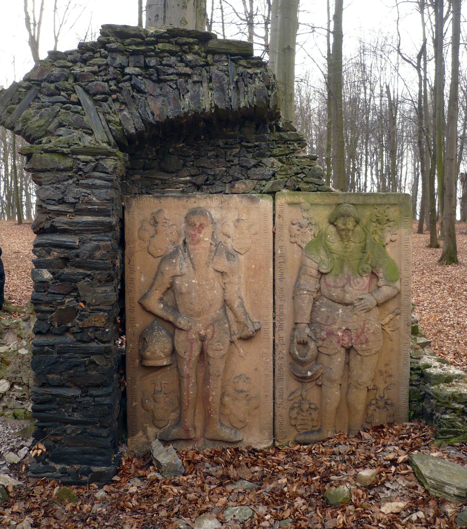 Sztuczna ruina w parku, Bożków